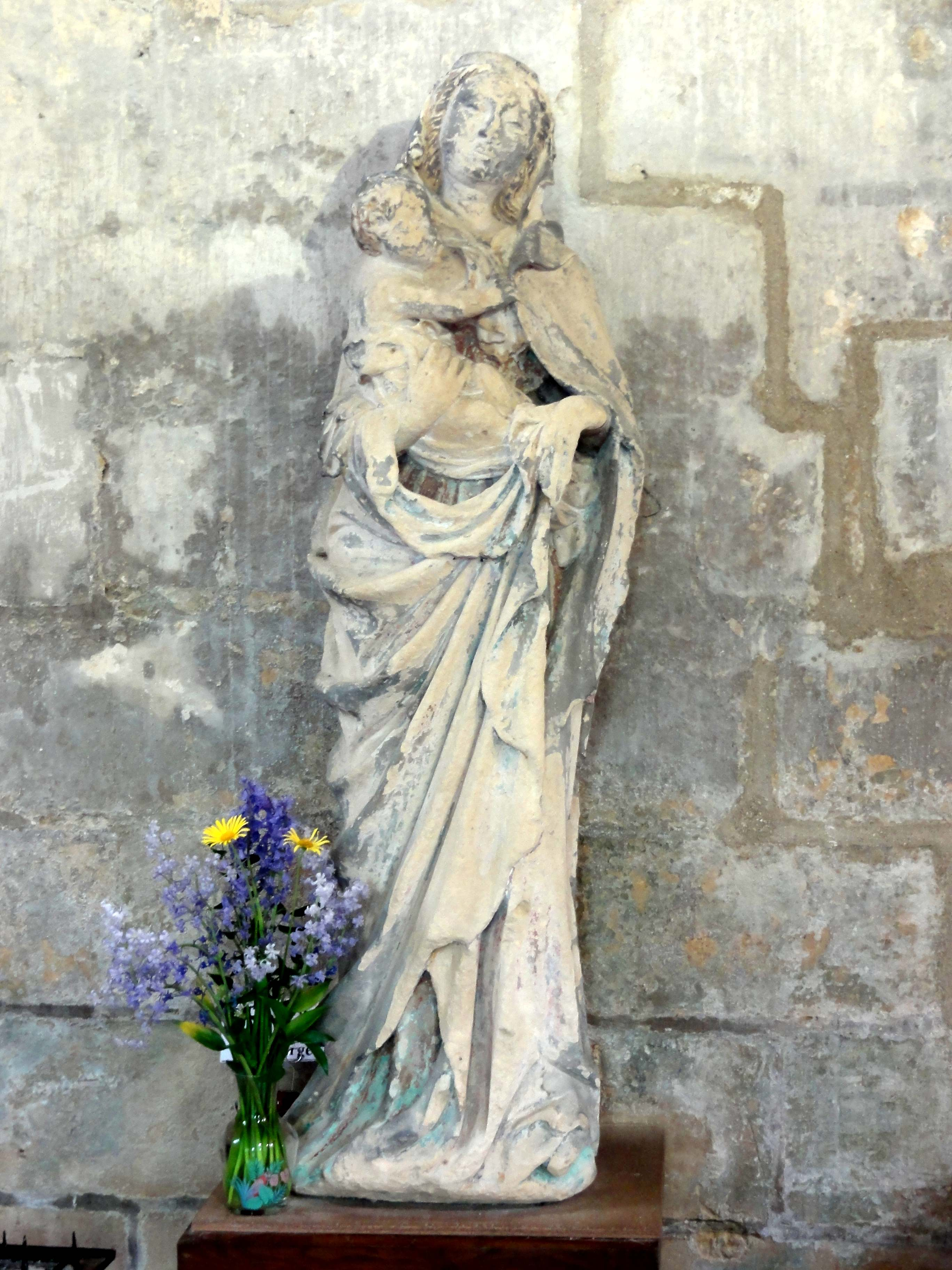 Mobilier de l'église Saint-Martin de Cires-lès-Mello (voir titre).